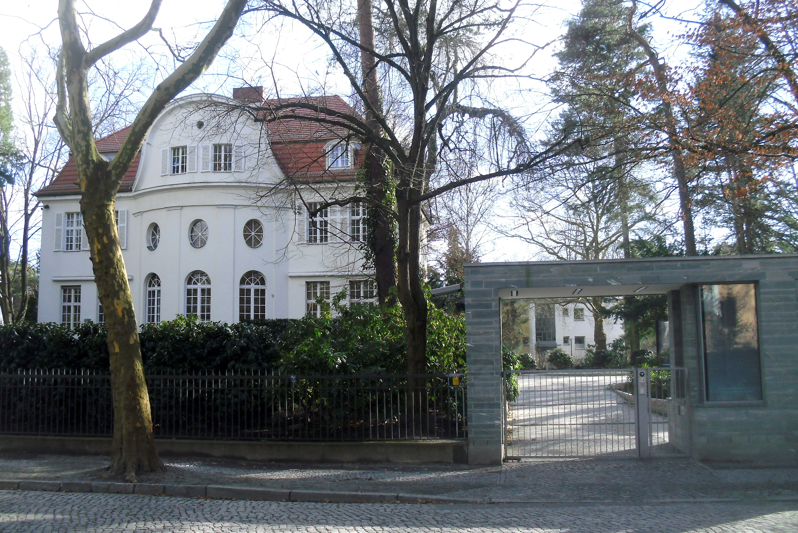 Villa Wurmbach, Berlin-Dahlem, Pücklerstraße 14, aktueller Dienst- und Wohnsitz des deutschen Bundespräsidenten